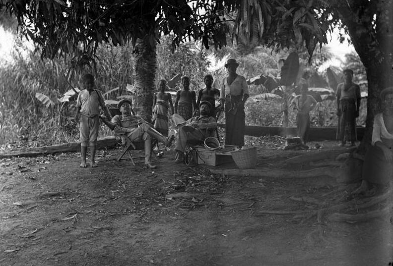 Kamerun, Weihnachten am Mungo Duala (Umgebung).- Weihnachten am Mungo 25.12.1901 [Kamerun, bei Duala.- Zwei weiße Siedler im Liegestuhl und Einheimische Kinder und Männer am Fluß Mungo]